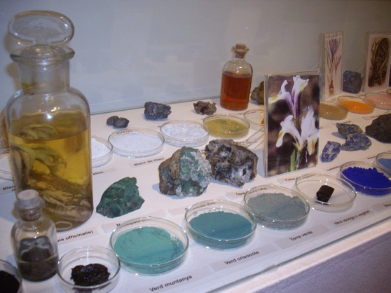 Punt de descoberta, pigments